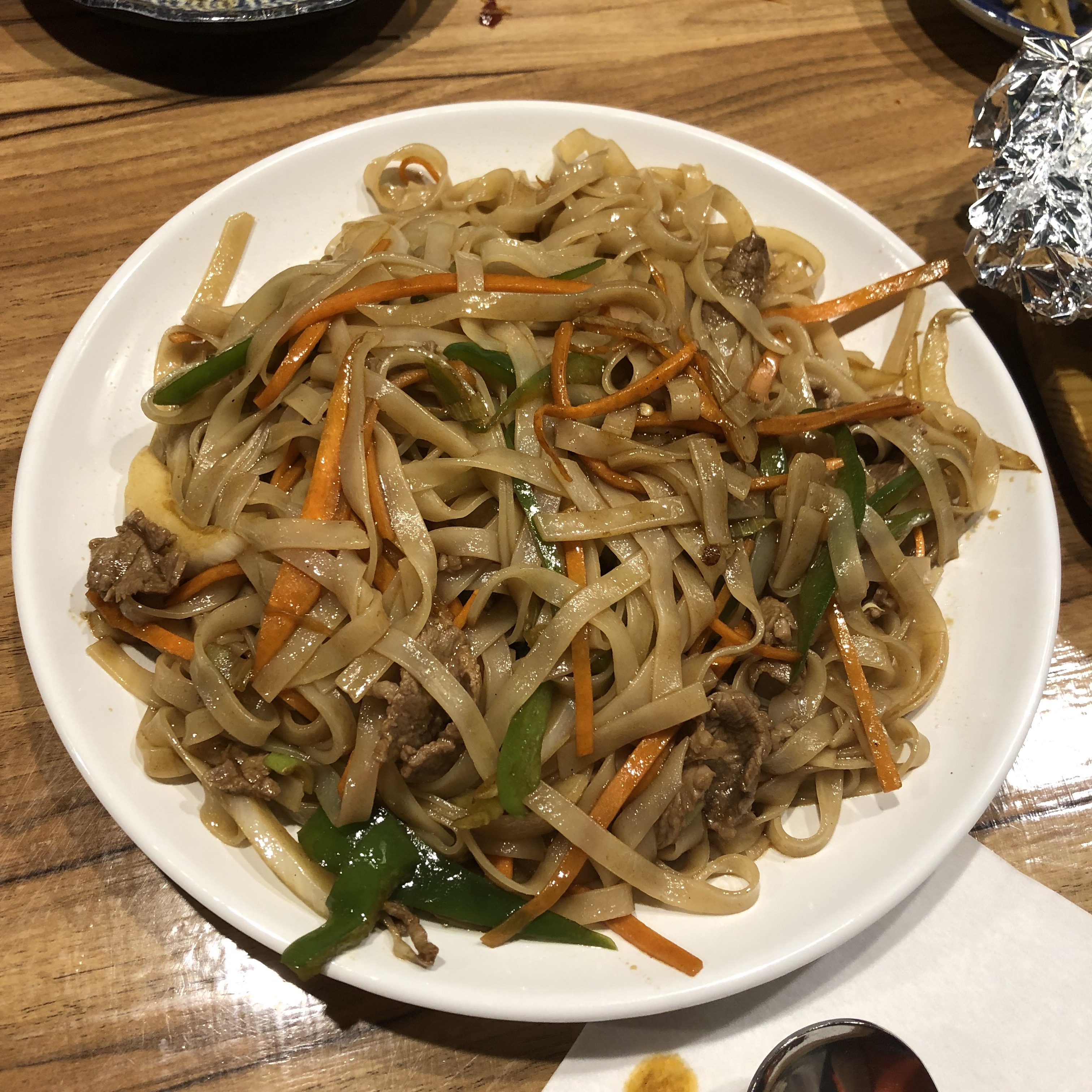 광주볶음면- 광둥식 소고기 볶음면